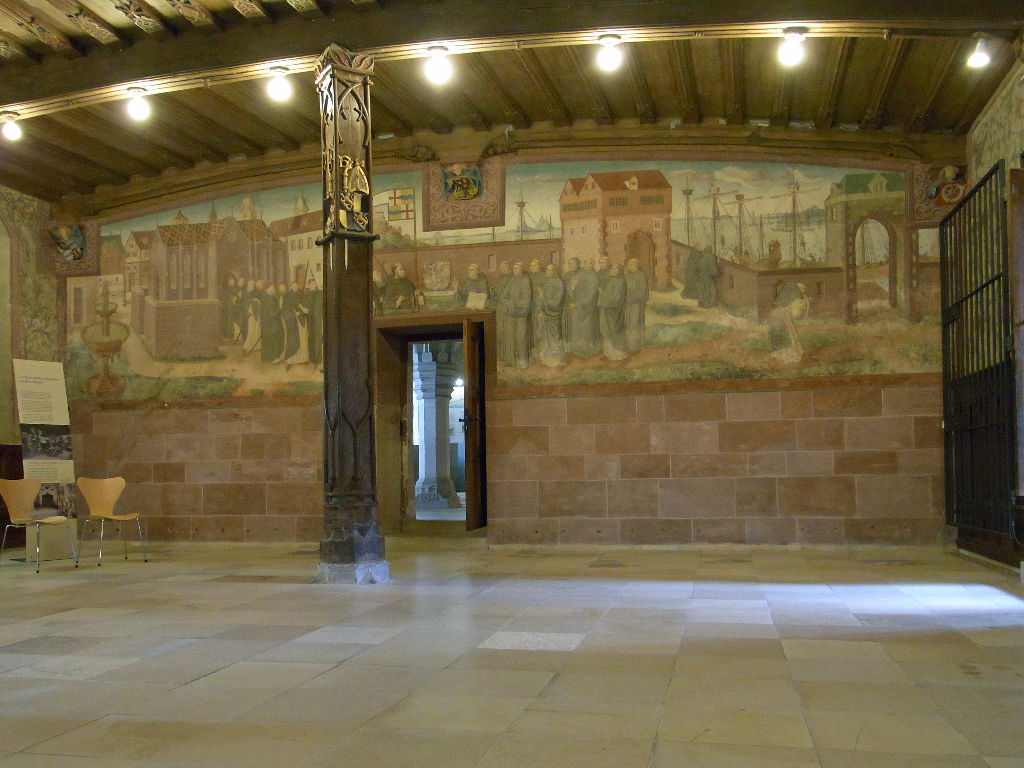 Kloster Bebenhausen: Winterrefektorium